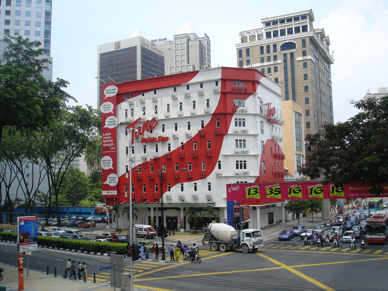 Tune Hotel at Jalan Tuanku Abdul Rahman, Kuala Lumpur.